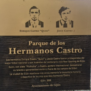 Placa del parque "Hermanos Castro", en Gijón. En homenaje a Enrique Castro González (Quini) y Jesús Castro González.